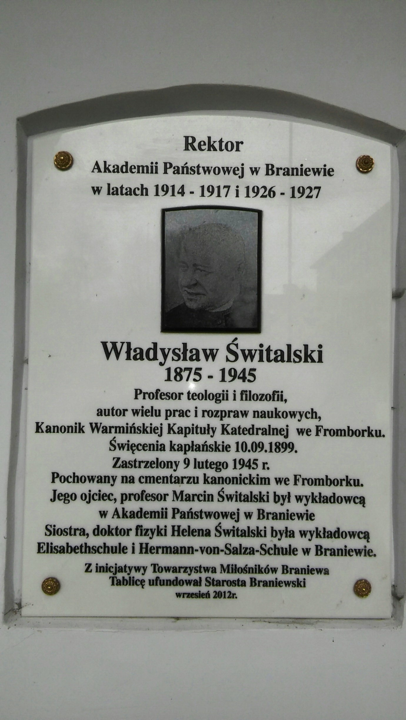 Władysław Świtalski